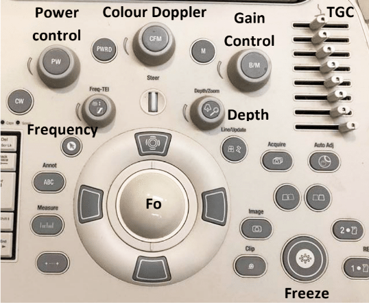 Disposición del panel